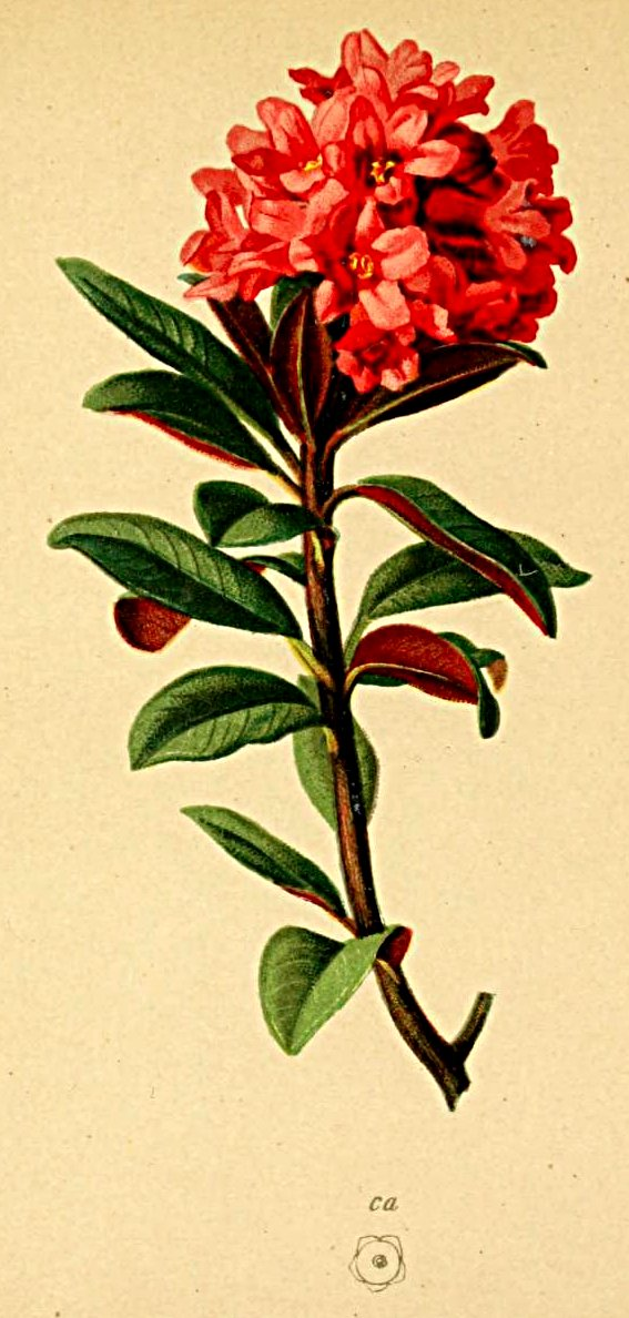 Rhododendron ferrugineum